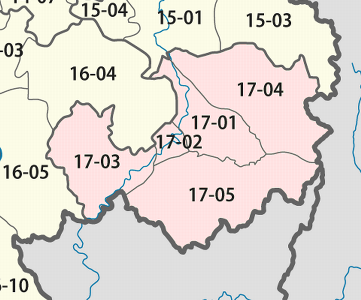 Giấy phép